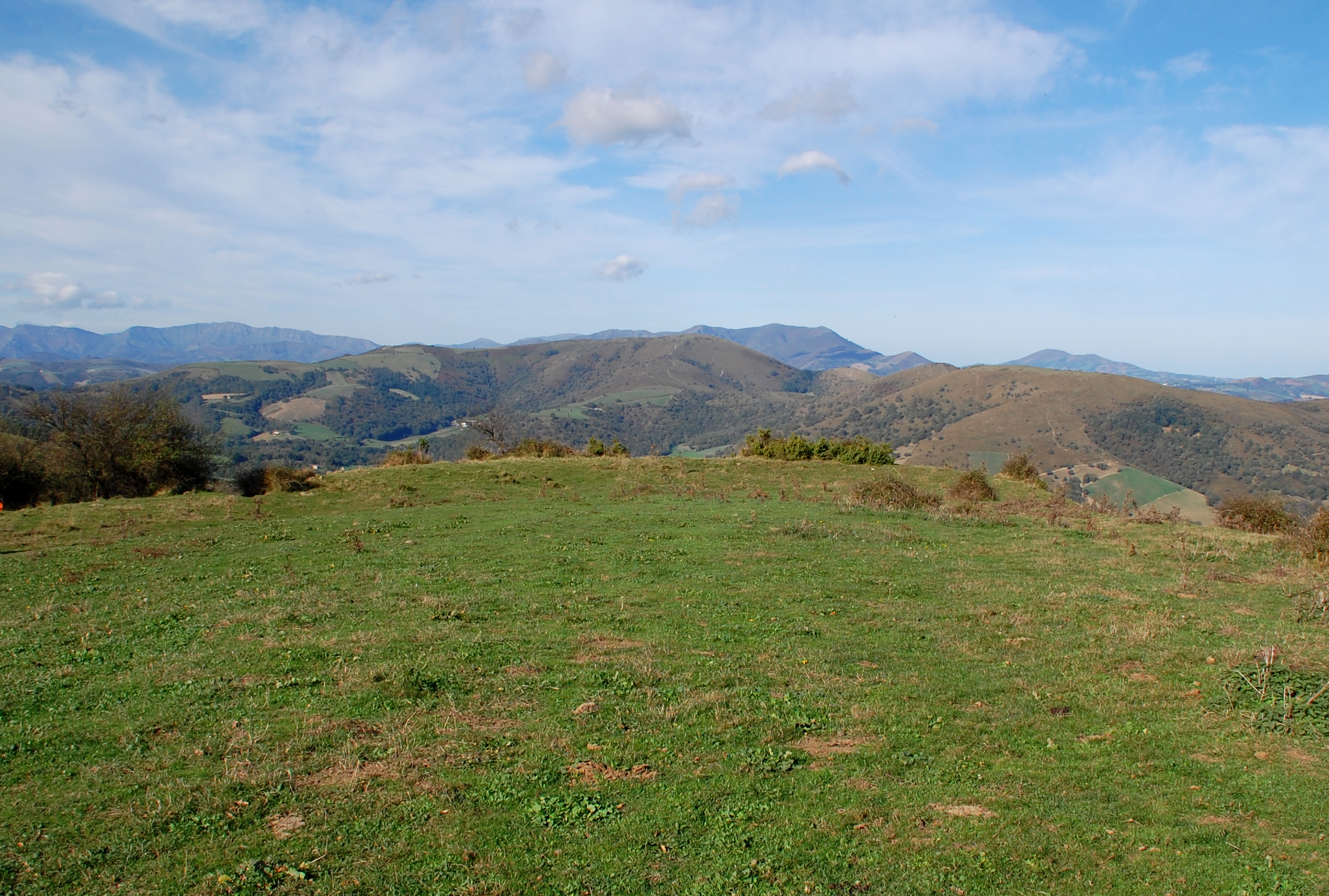 Gaztelu Zahar de Larceveau : le parapet de terre reste bien visible côté Ouest.